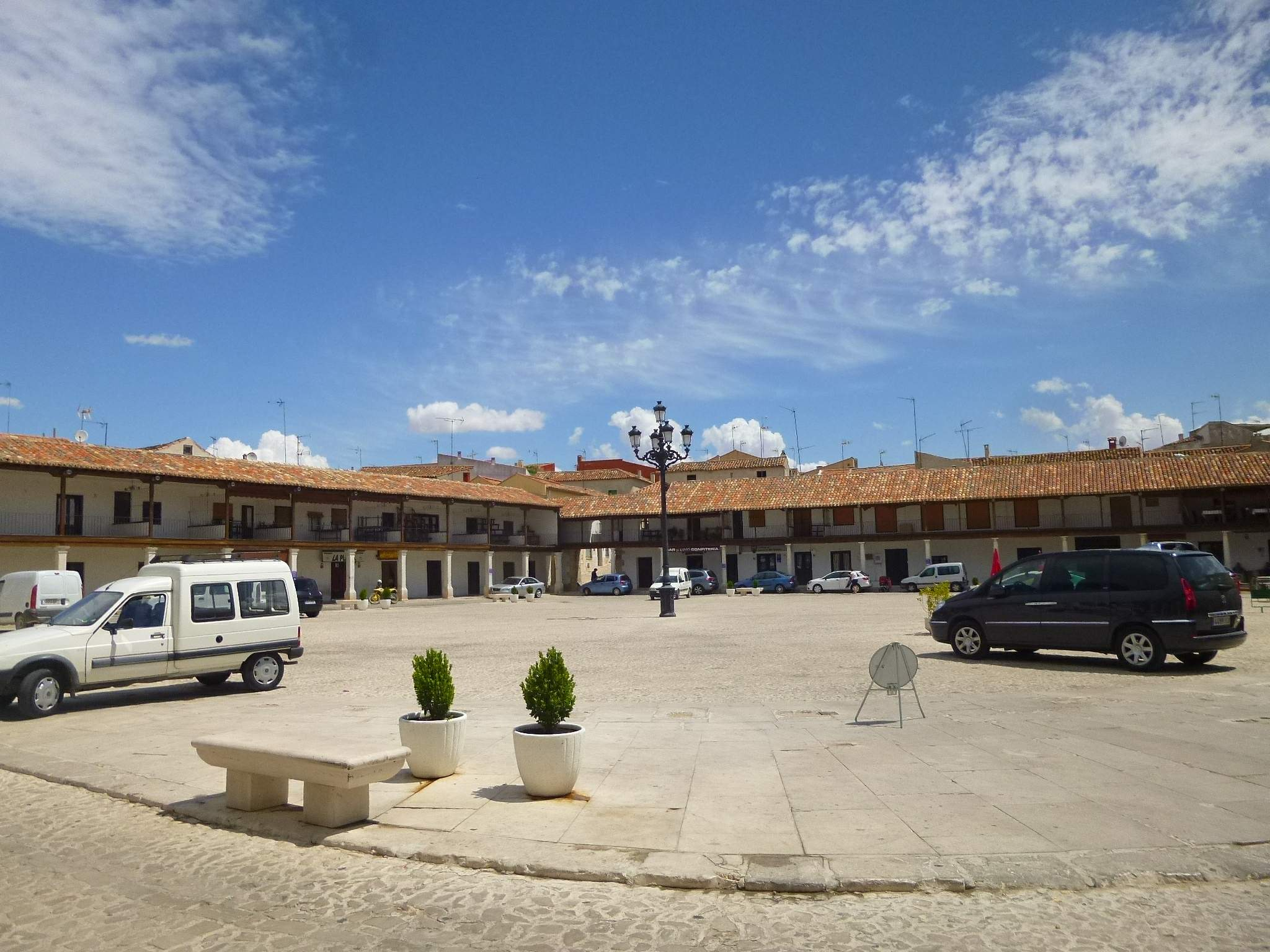 Plaza Mayor de Colmenar de Oreja